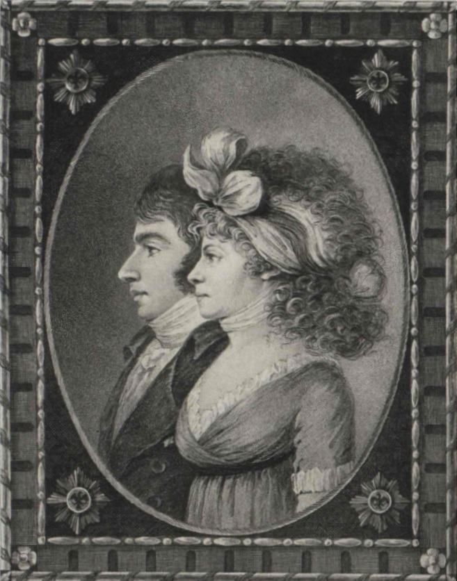 Беларуская (тарашкевіца): Партрэт Антонія (Antoni Radzivił) і Людвікі (Ludvika Radzivił) Радзівілаў (Radziviły)